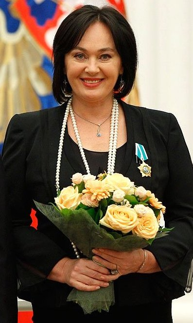 МОСКВА, КРЕМЛЬ. Церемония вручения государственных наград. Орден Дружбы вручен актрисе Ларисе.Гузеевой